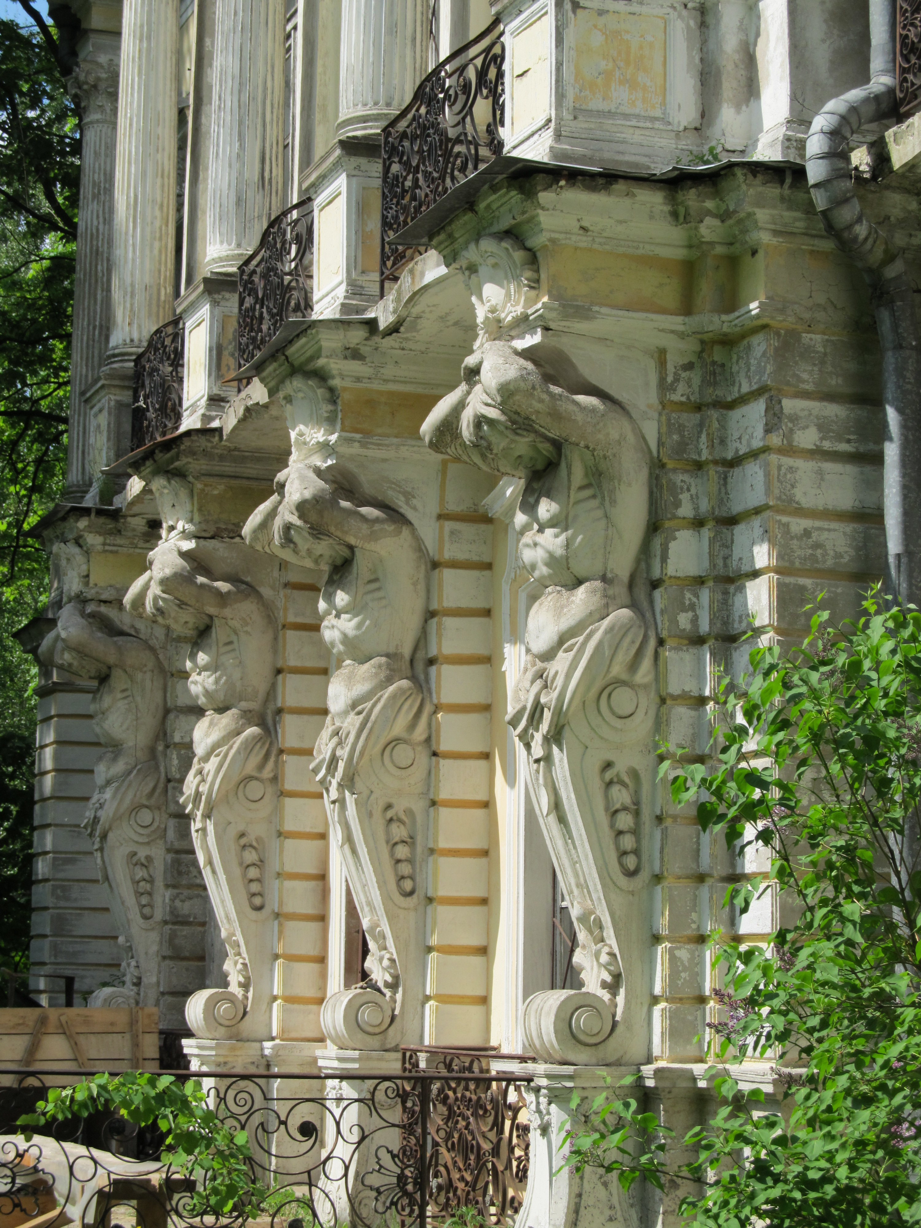 Дворец: проспект Собственный, 84, Петергоф, Петродворцовый район, Санкт-Петербург